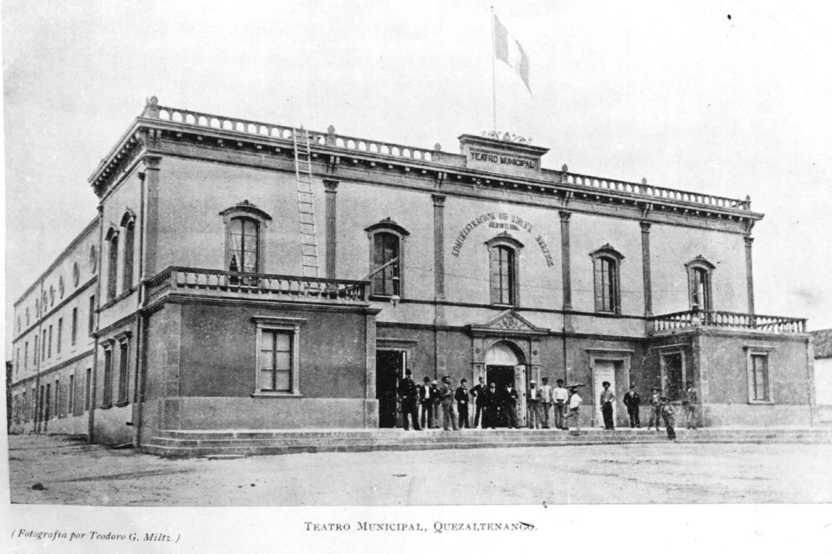 Día de la inauguración del teatro municipal en la fachada se puede leer: Administración Reina Barrios